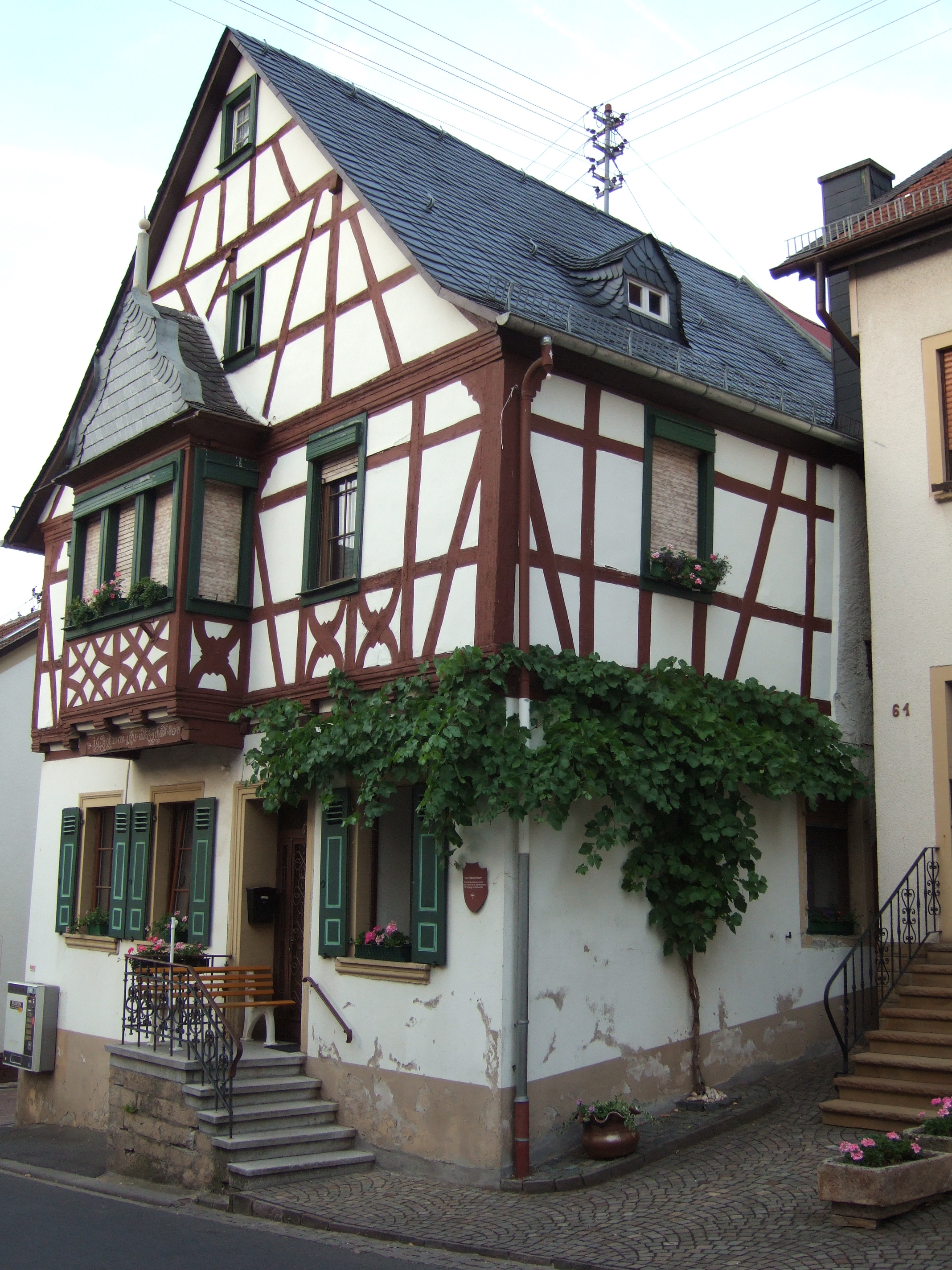 Haus Pathenheimer, Monzingen